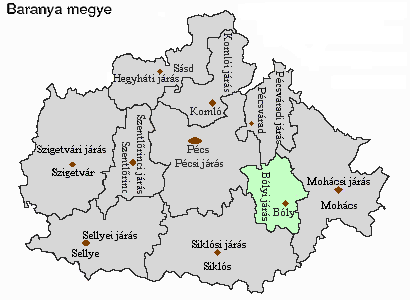 Magyarország, Baranya megye, Bólyi járás